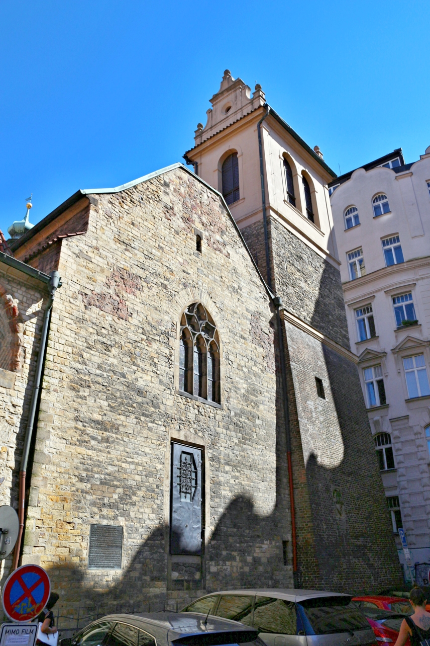 Praha 1-Staré Město, kostel sv. Martina ve zdi